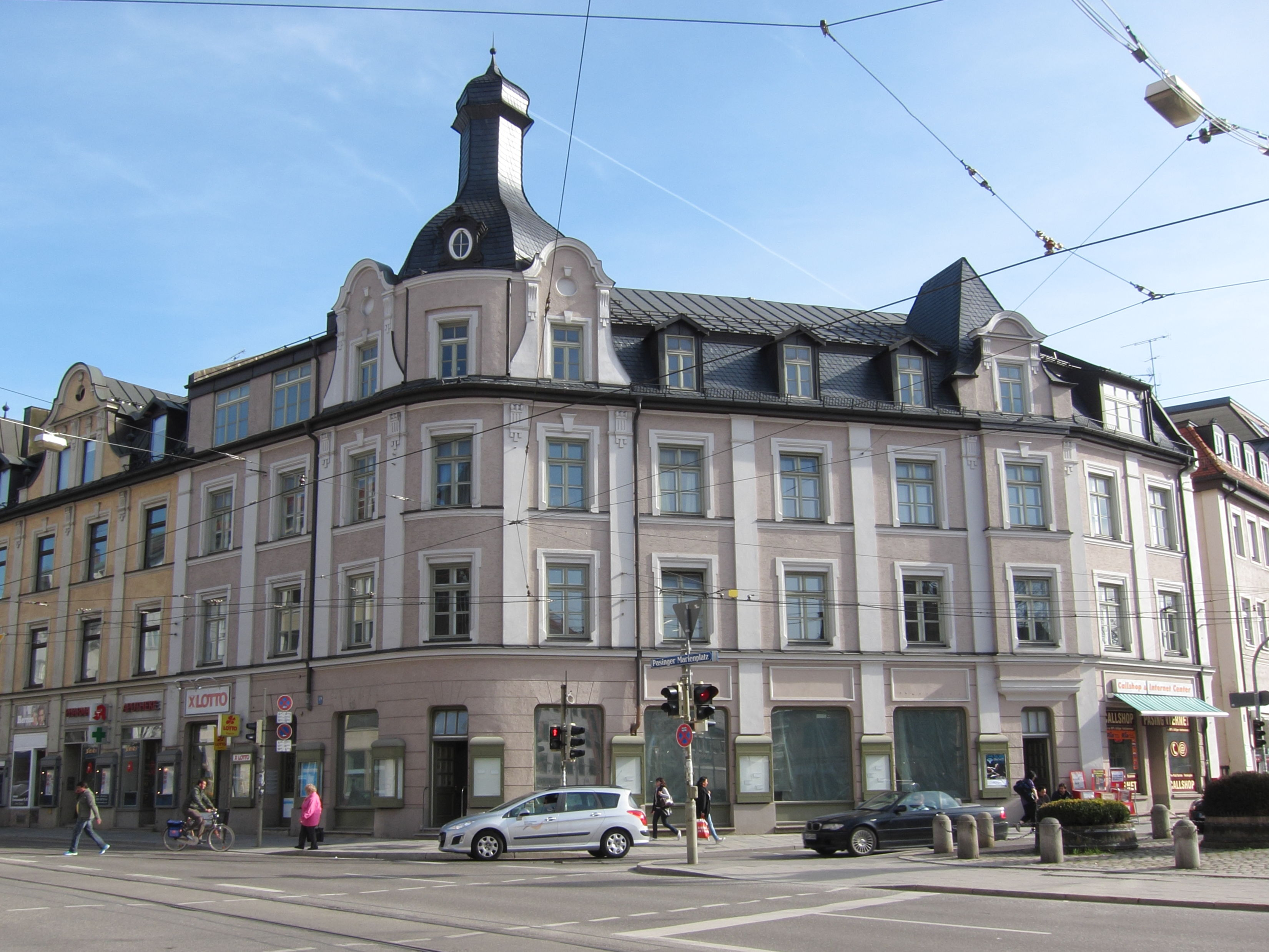 Landsberger Straße 529; Wohn- und Geschäftshaus, neubarock, in Ecklage zum Pasinger Marienplatz, Turm mit Laterne, 1897 von Johann Hieronymus; Gruppe mit Nr. 527; Ursprünglich bekannt als Hieronymus-Haus, später als "Kring-Haus", vermutlich nach "Spedition Kring" (pasinger-archiv.privat). Am rechten Bildrand die vormalige "Weissbierbrauerei und Metzgerei Röder." Vgl. auch Ensemble Ortskern Pasing.